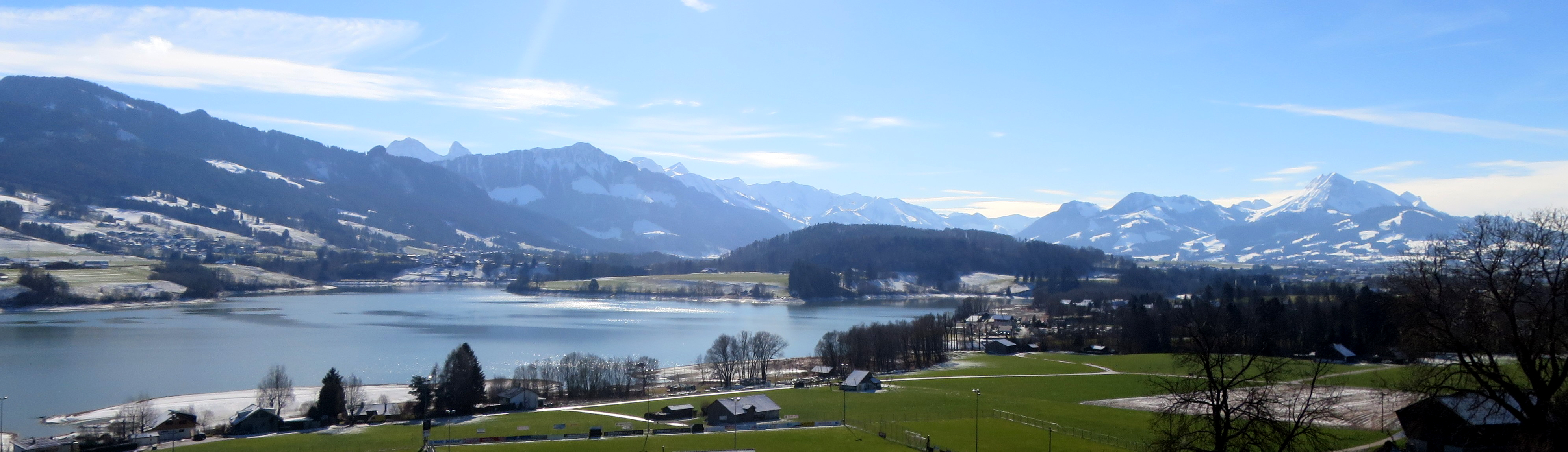 Lac de la Gruyère et Alpes Fribourgois. Vue de l'autoroute chez Gumefens.